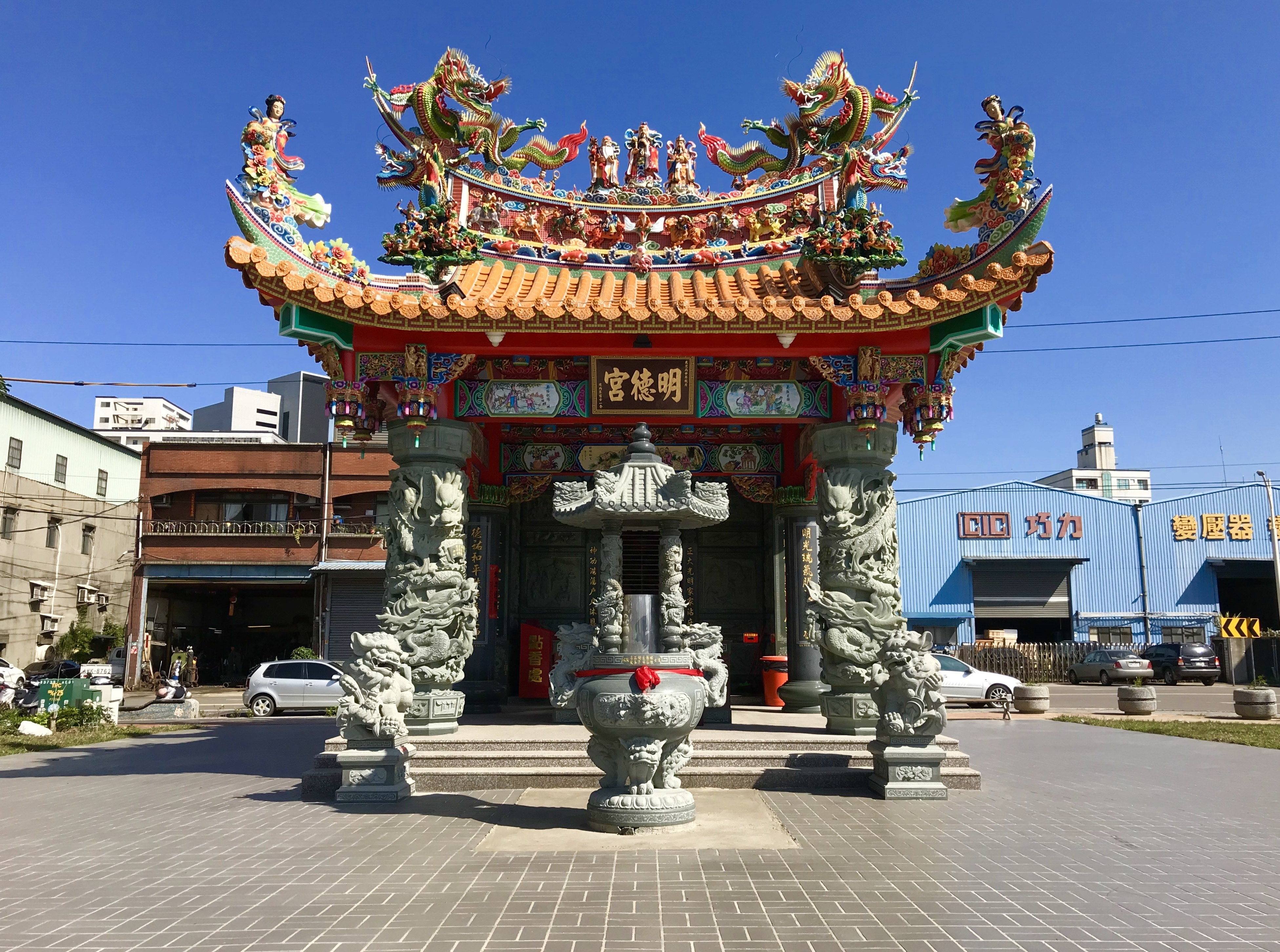 中文（台灣）: 汴洲里明德宮正面照